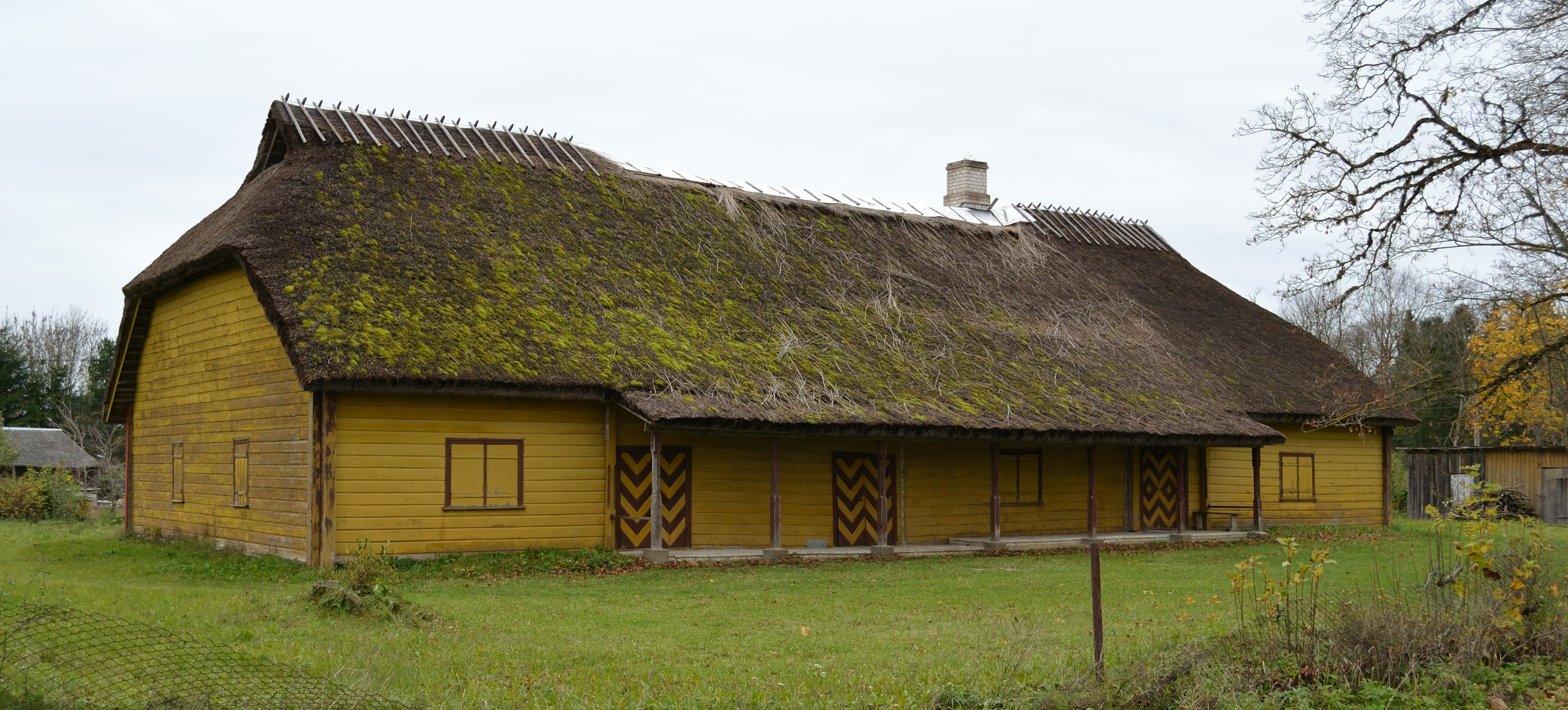 Hageri vennastekoguduse palvemaja, Hageri küla